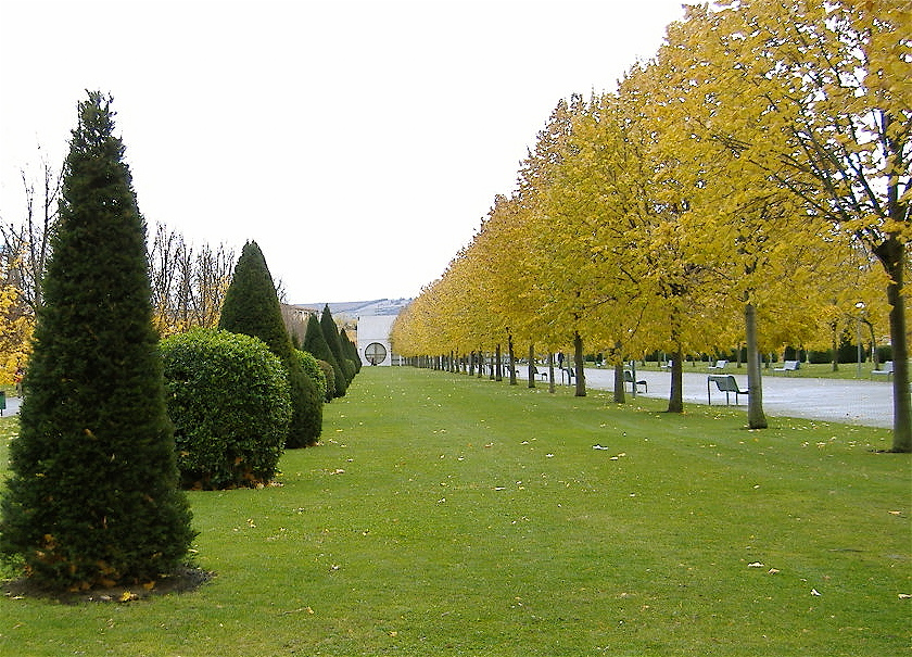 Campus de la UPNA en Arrosadia (Pamplona)